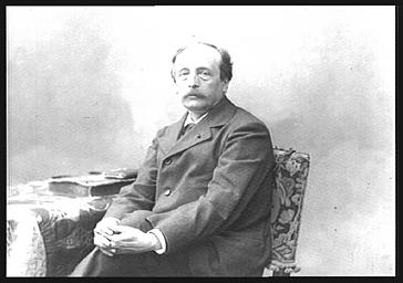 Portrait d'Oscar Roty par Nadar